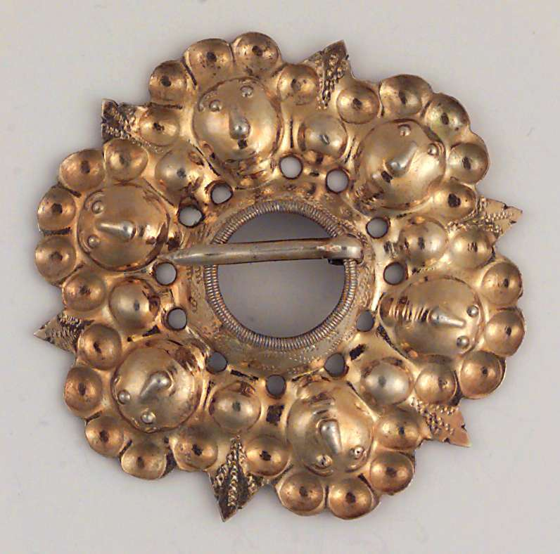 Glibbsølje av forgylt sølv fra Kvam i Hordaland. Denne typen er vanlig på Vestlandet, men den har som oftest festet hengende løv midt på glibbene. Diameter 5 cm. Foto Anne-Lise Reinsfelt/Norsk Folkemuseum.